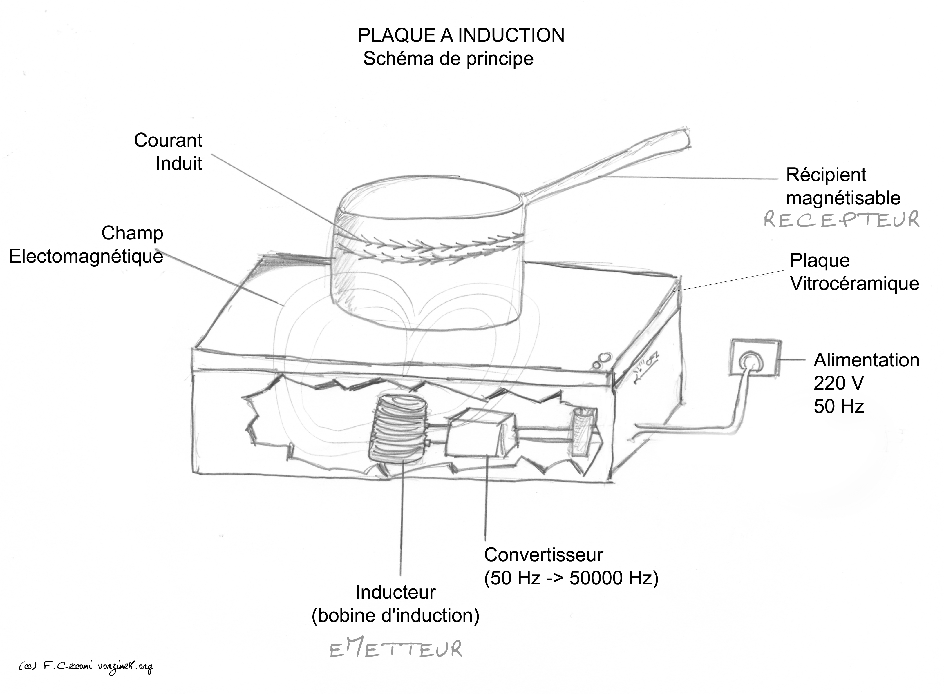 schema de principe de la plaque à induction